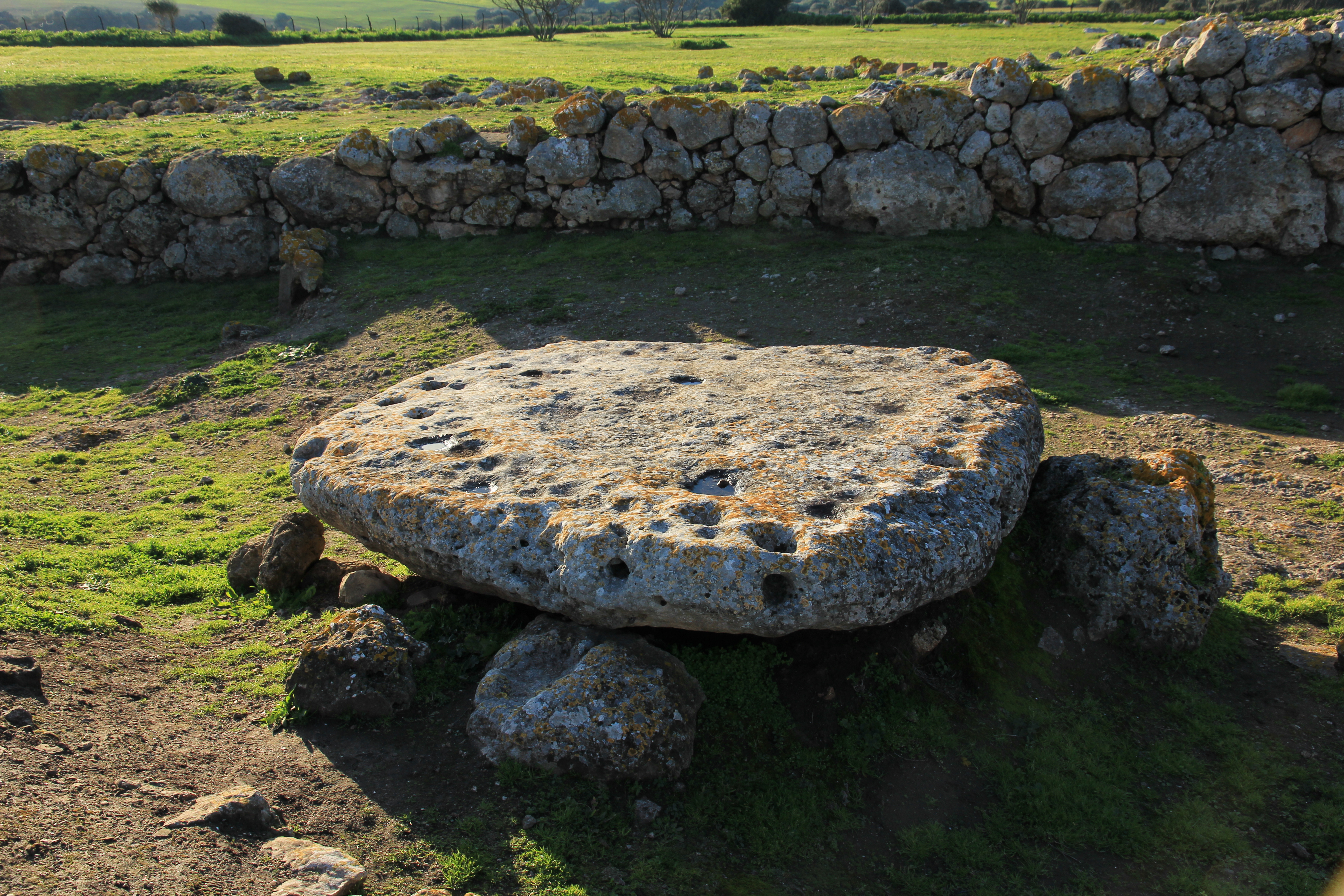 Sassari - Complesso prenuragico di Monte d'Accoddi